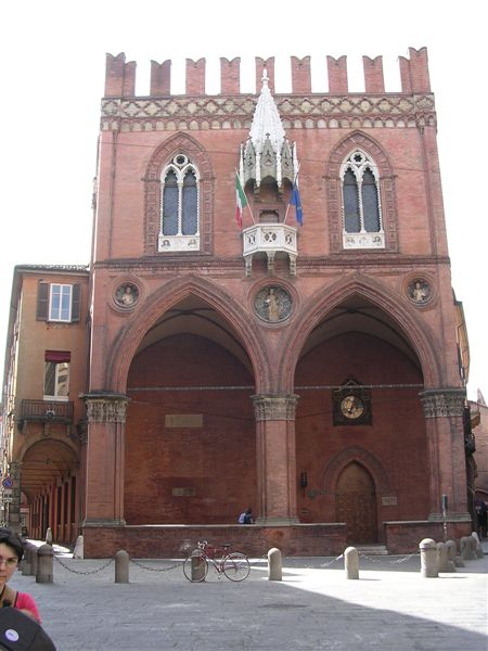 Bologna - Palazzo della Mercanzia Picture by Paolo Carboni (myself).